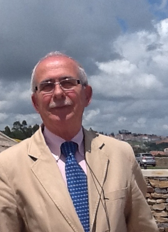 El profesor Francisco García Tortosa fotografiado en Santiago de Compostela (Cidade da Cultura) en julio de 2012.